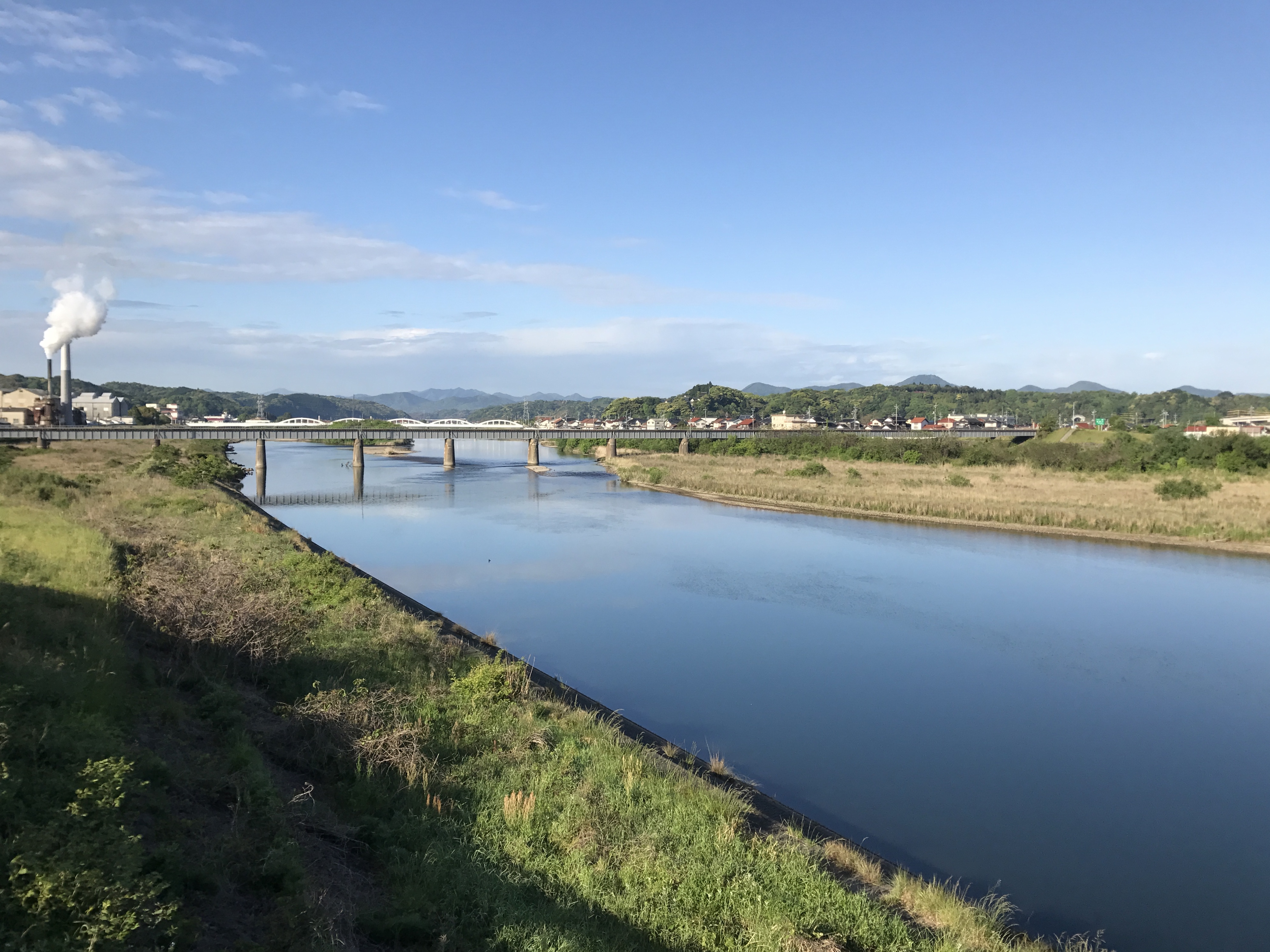 高津大橋より望む高津川(上流側)と山陰本線の高津川橋梁